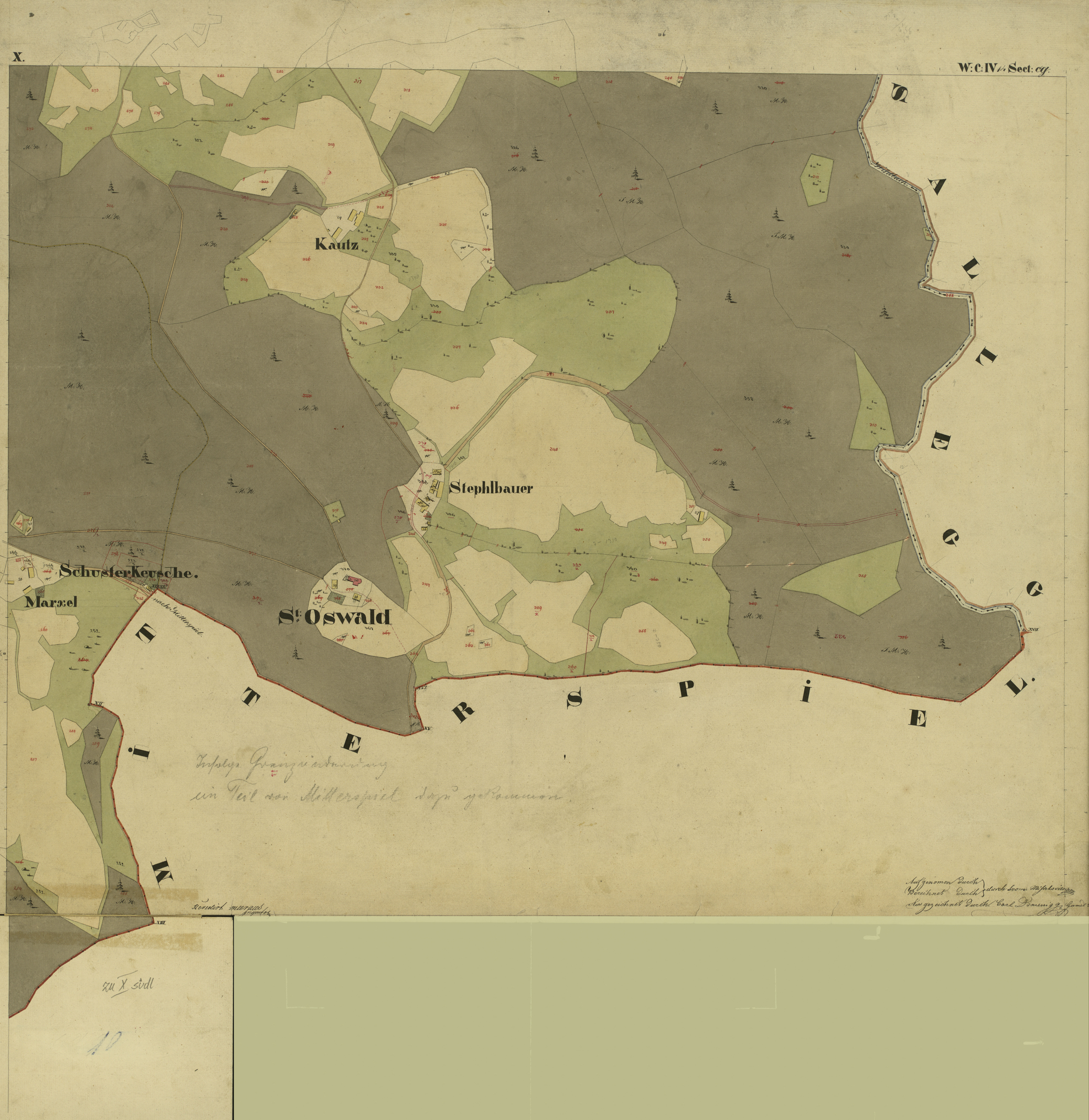 historische Vermessungskarte: österreichischer Kataster, Gemeinde Kloster. 1825. Blatt X mit der Grenze vor der Veränderung 1891.